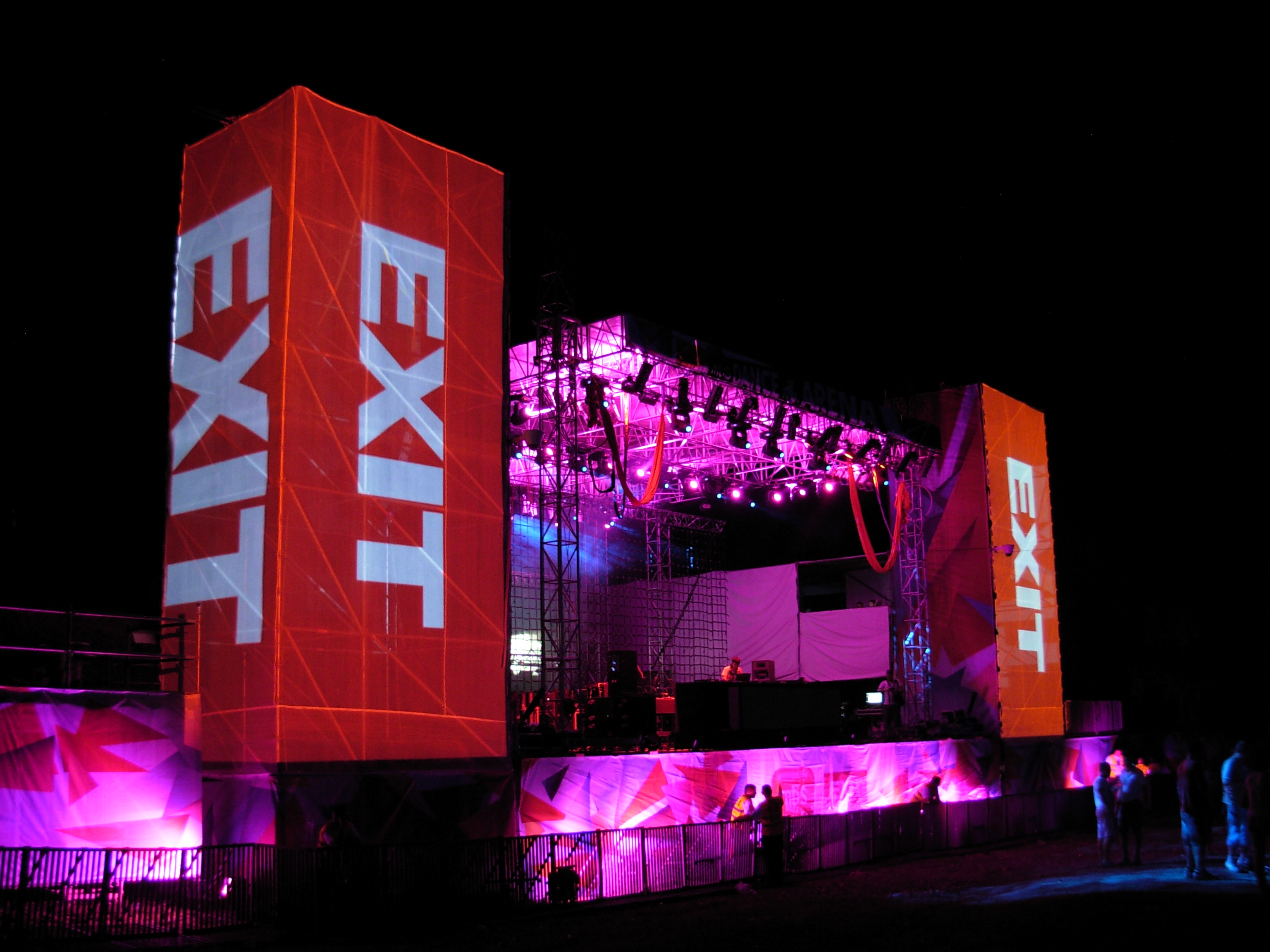 Dance Arena.